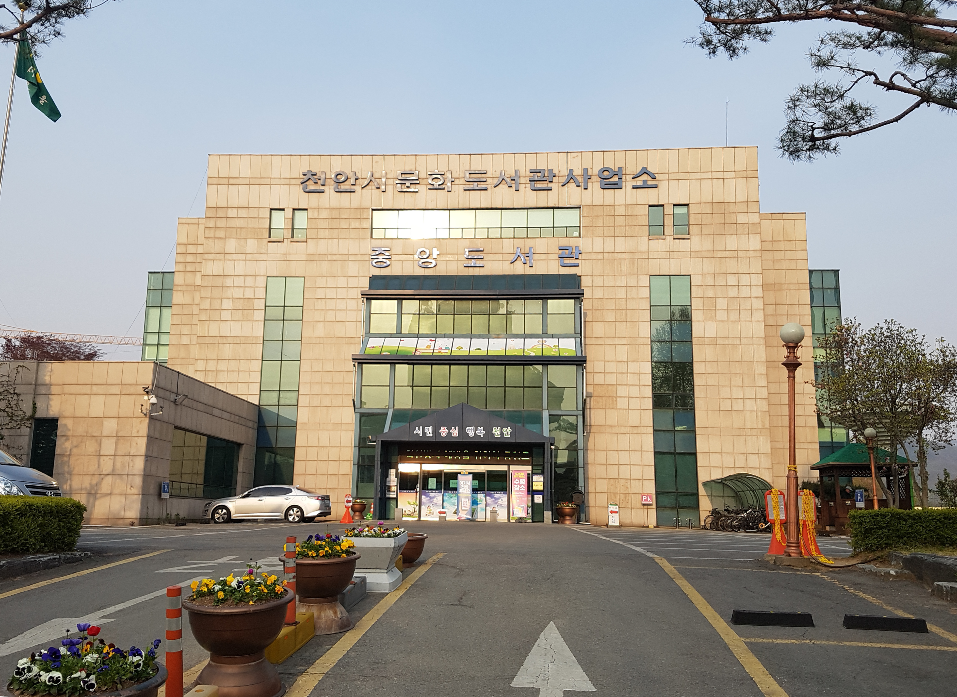 천안중앙도서관